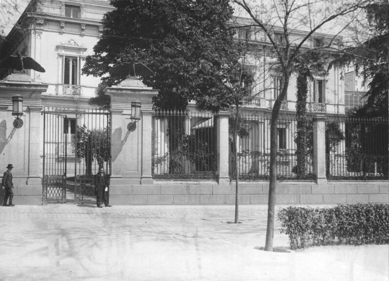 Madrid, Deutsche Botschaft Spanien, Madrid um 1930 Das Gebäude der Botschaft auf dem Paseo de la Castellane in Madrid